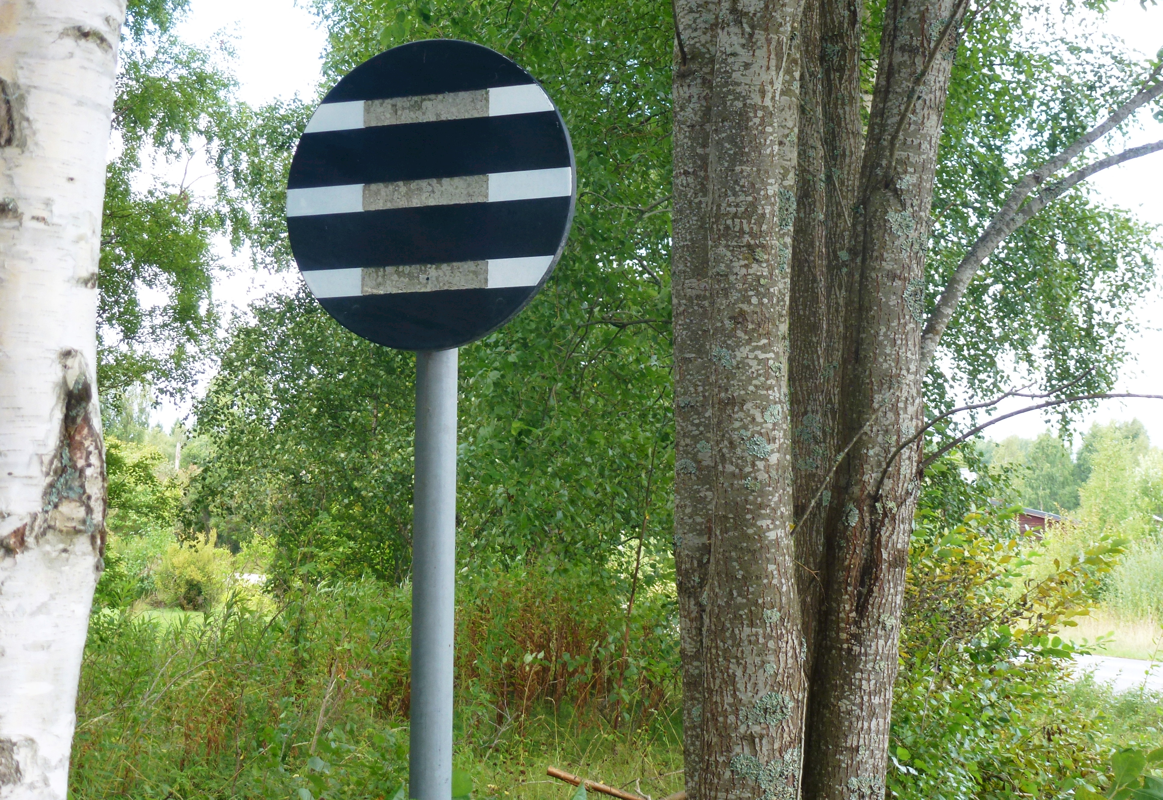 Ploglyfttavla vid korsningen med Stationsvägen vid Grangärde